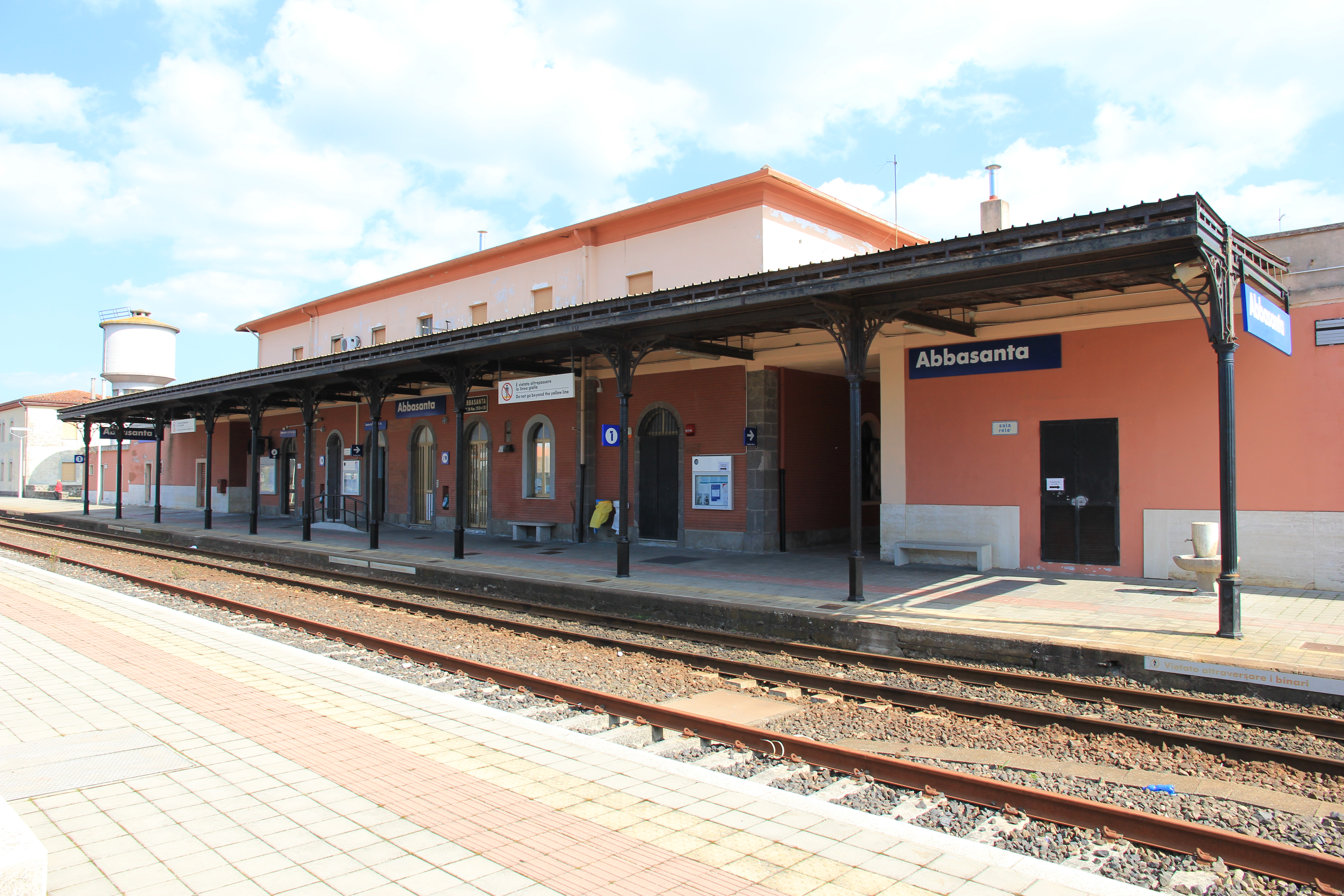 Abbasanta - Stazione ferroviaria